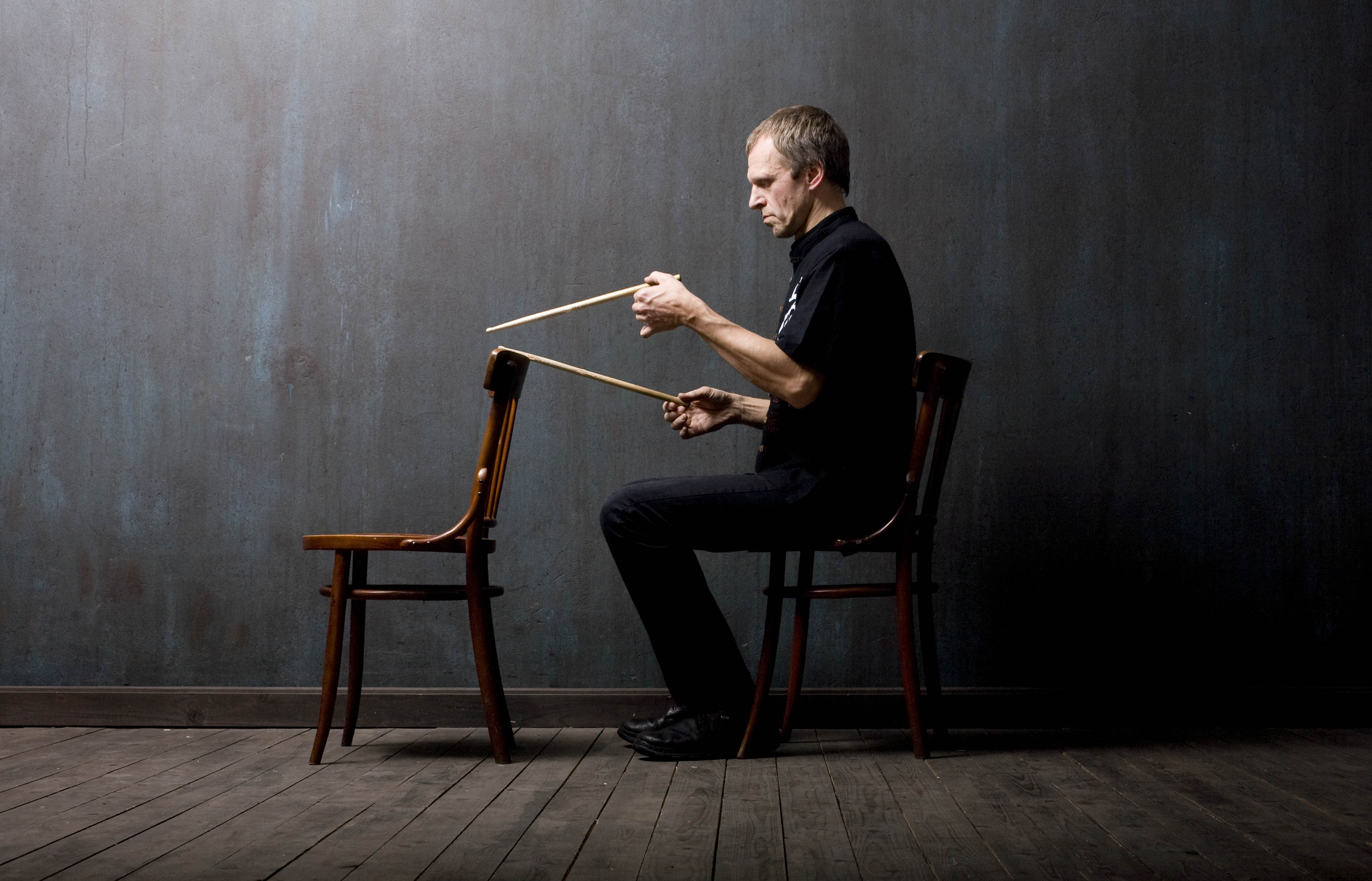 foto. Vilmantas Dambrauskas